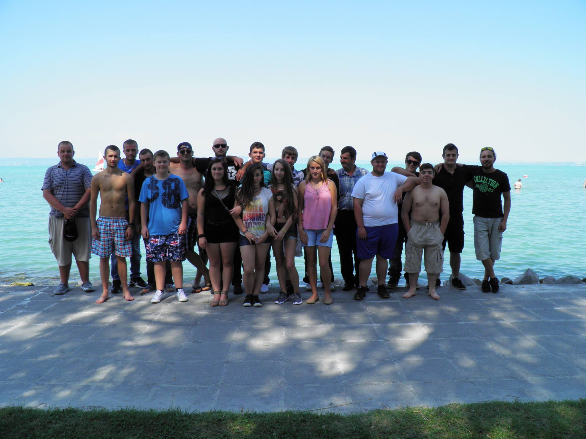 A "Hegyalja" ifjúsági egyesület tagjai